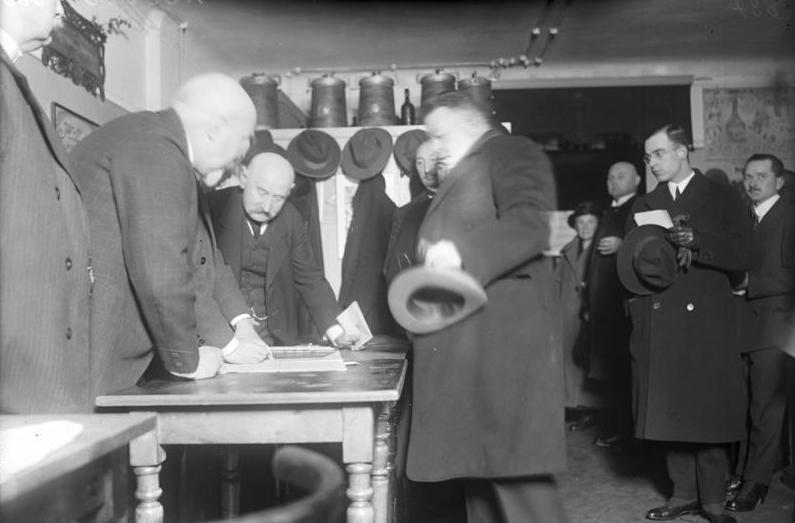 Der Wahlsonntag in Berlin, welcher mit großen Propaganda -Aufzügen von jeder Partei aus betrieben wurde. Reichspräsident Ebert gibt seinen Wahlzettel an der Urne ab.